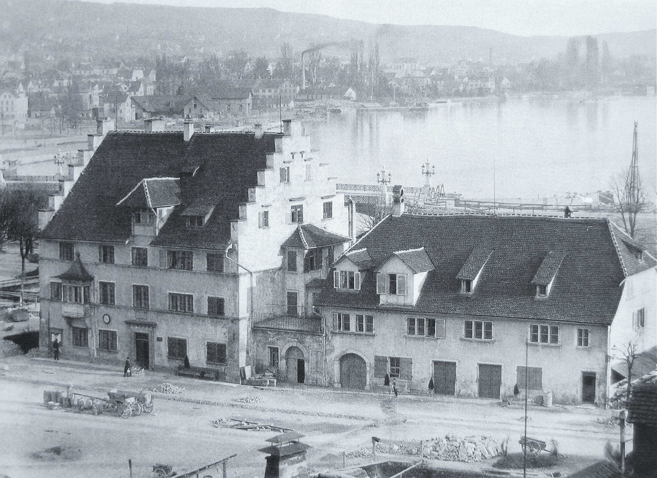 Zürichs altes Stadthaus 1883